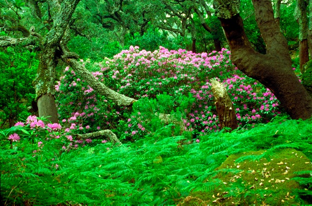 Rododendro u Ojaranzo de la Garganta de Puerto Oscuro, Sierra del Aljibe, Parque Natural Los Alcornocales, provincia de Cádiz.